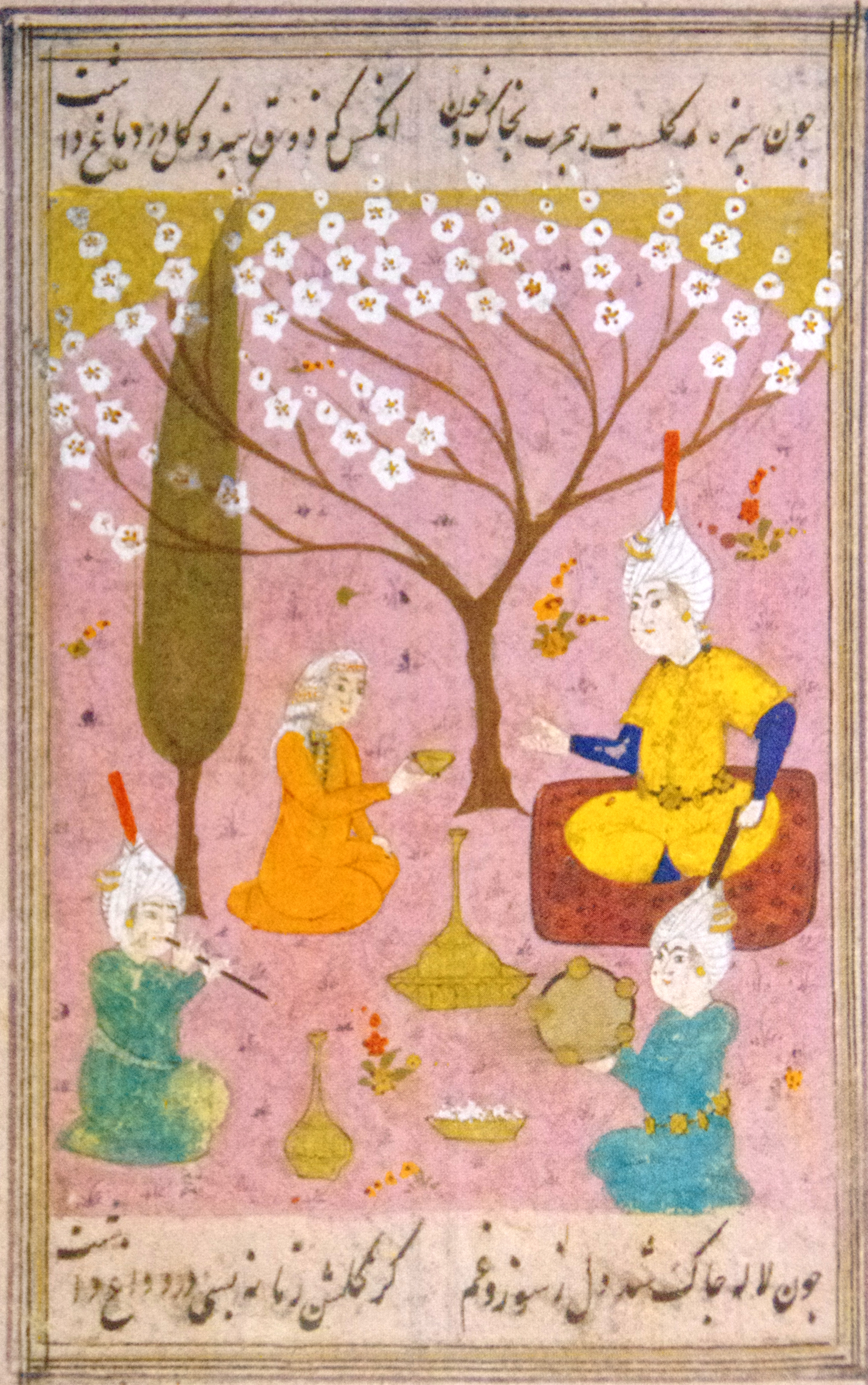 Balaban və qavalın müşayəti ilə musiqi məclisi: Səfəvilər dövlətinin ikinci şahı I Təhmasibə kəniz tərəfindən bir piyalə şərab süzülərkən təsvir olunmuş minyatür, eni 5,2 sm, hündürlüyü 7 sm